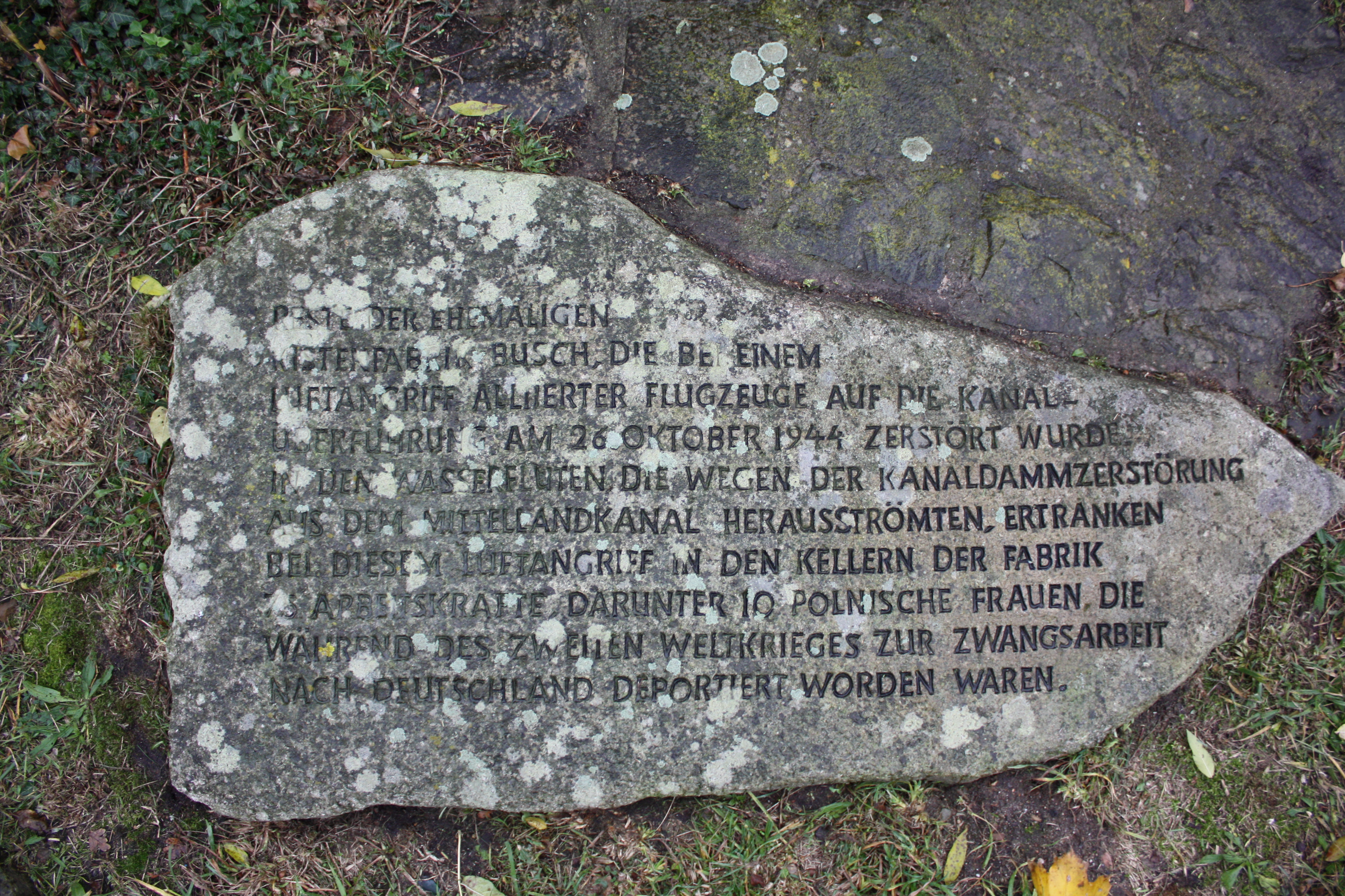 Gedenktafel an der alten Brücke am Wasserstraßenkreuz Minden in Minden, Kreis Minden-Lübbecke, Nordrhein-Westfalen. Inschrift:RESTE DER EHEMALIGENKISTENFABRIK BUSCH, DIE BEI EINEMLUFTANGRIFF ALLIIERTER FLUGZEUGE AUF DIE KANAL-ÜBERFÜHRUNG AM 26. OKTOBER 1944 ZERSTÖRT WURDE.IN DEN WASSERFLUTEN, DIE WEGEN DER KANALDAMMZERSTÖRUNGAUS DEM MITTELLANDKANAL HERAUSSTRÖMTEN, ERTRANKEN BEI DIESEM LUFTANGRIFF IN DEN KELLERN DER FABRIK75 (vgl. Luftangriff auf Minden im Zweiten Weltkrieg)] ARBEITSKRÄFTE, DARUNTER 10 POLNISCHE FRAUEN, DIEWÄHREND DES ZWEITEN WELTKRIEGS ZUR ZWANGSARBEITNACH DEUTSCHLAND DEPORTIERT WORDEN WAREN.